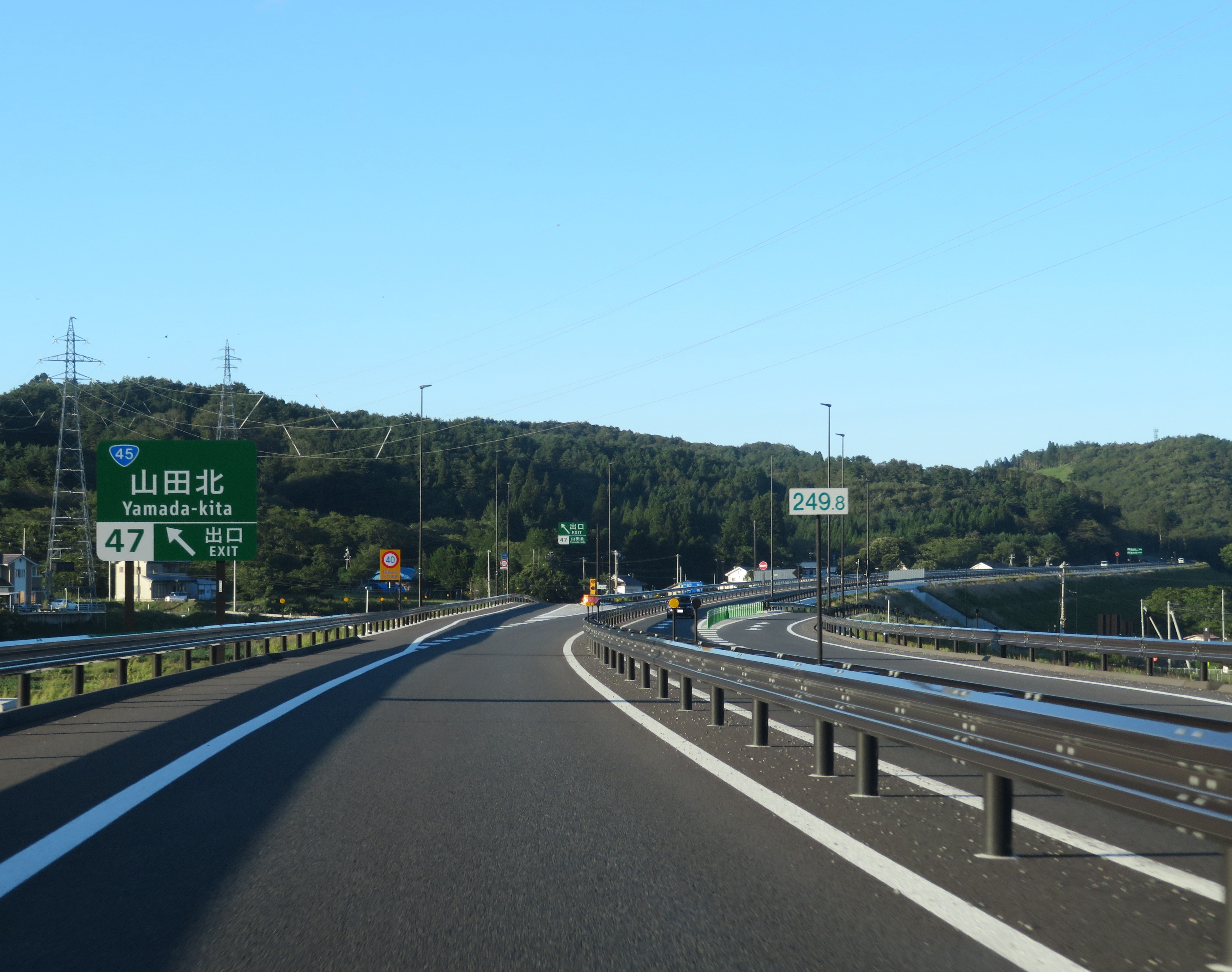 三陸自動車道山田北インターチェンジ出口付近（釜石方面側から撮影）